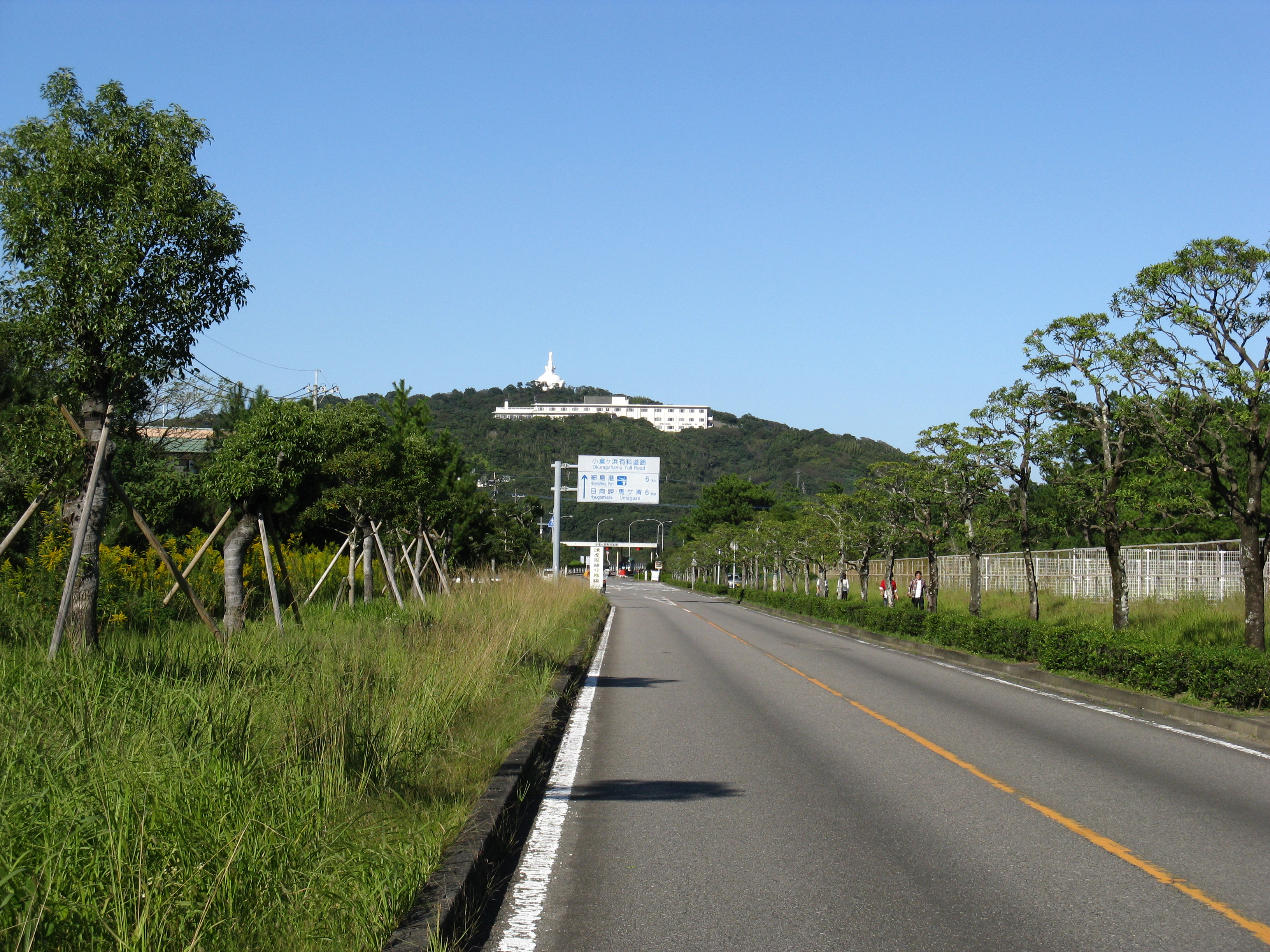 小倉ヶ浜有料道路（細島・延岡方面）